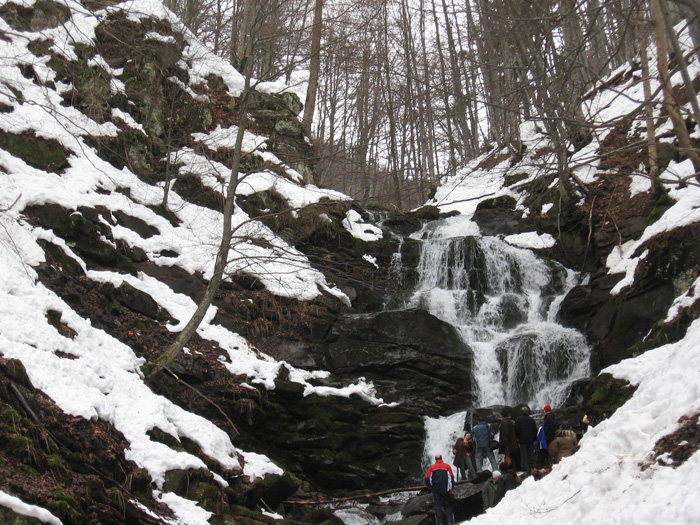 Bодопад Шипот, Закарпатская областьВид на водопад Шипот (Шипит), неподалеку от села Пилипец, Закарпатская область